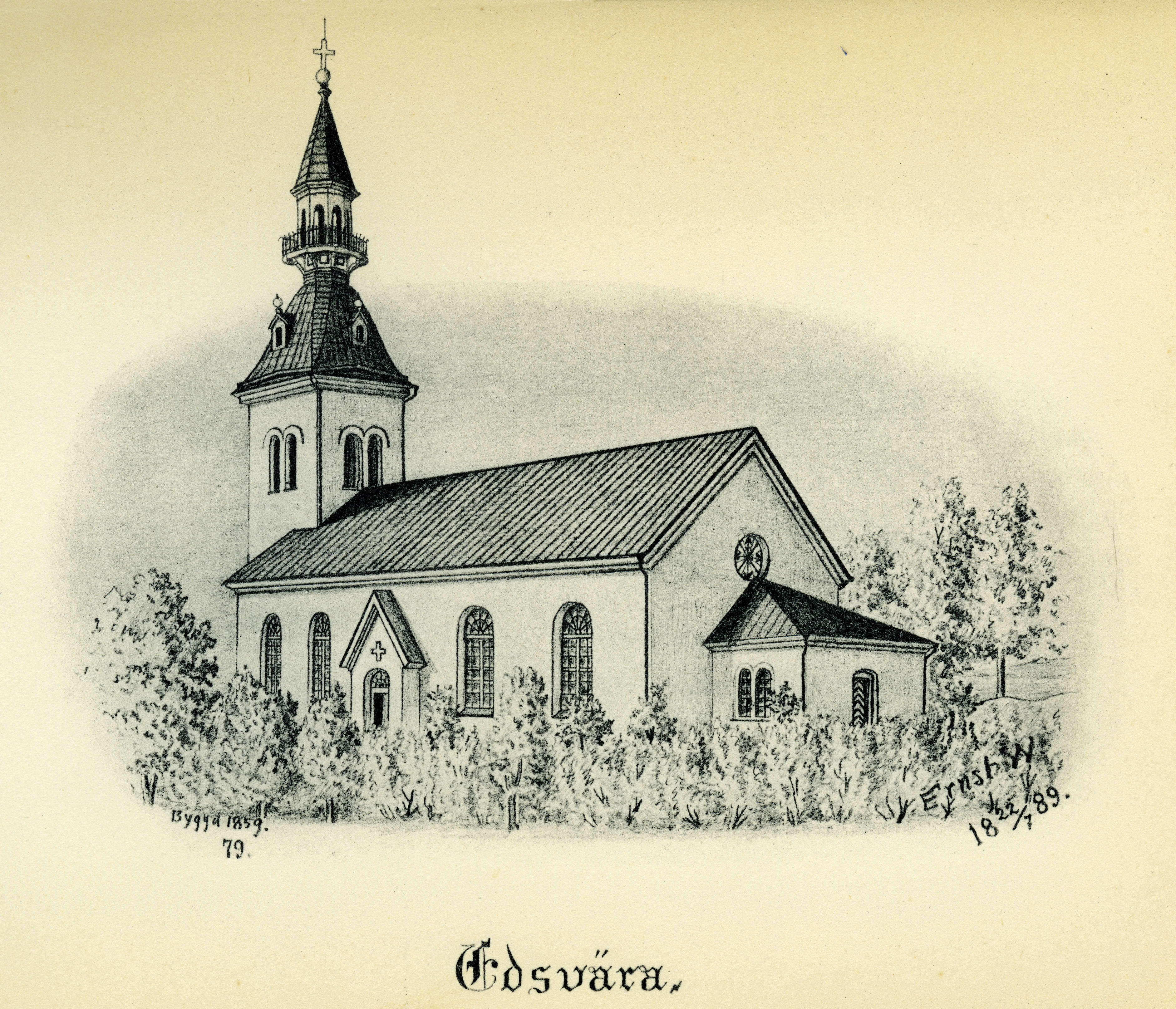 Edsvära kyrka år 1889 i Skånings härad, Skara stift, Västergötland, Sverige. Teckning av Ernst Wennerblad ur Skara stifts kyrkor (1902).